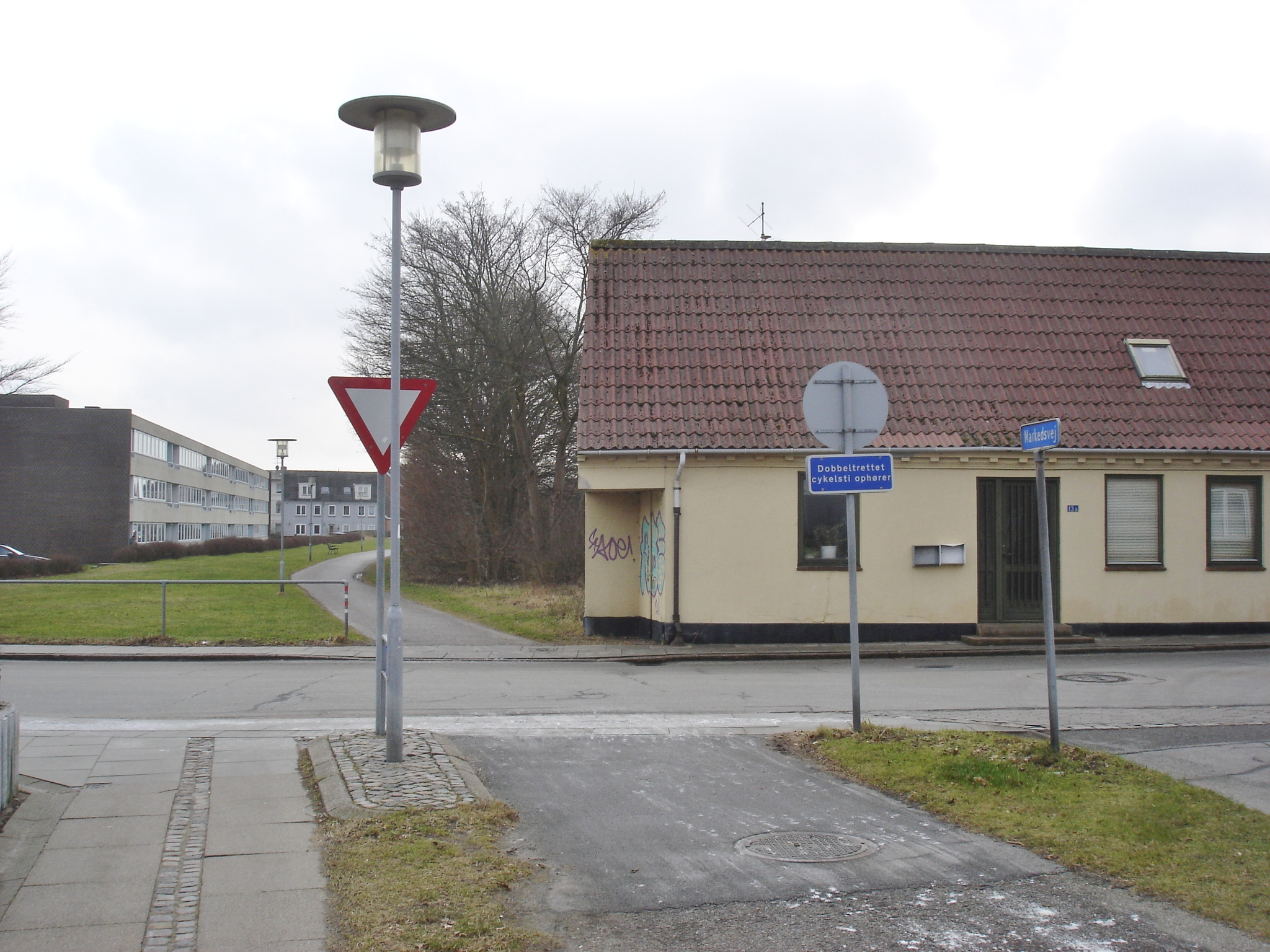 Vendsysselbanens bevarede nedlagte tracé krydser Vestergade i Frederikshavn